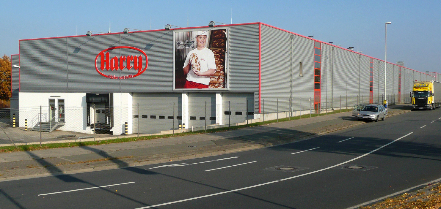 Harry Brot Produktion Hannover